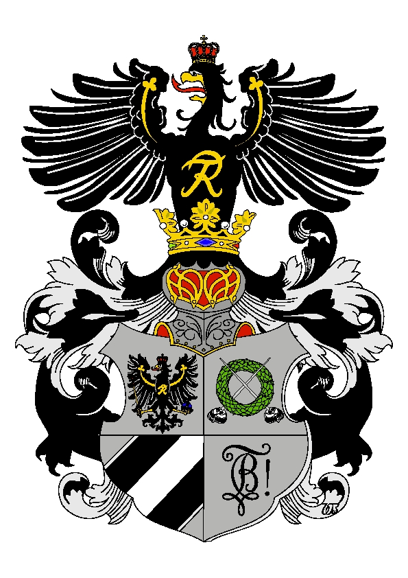 Studentenwappen des Corps Borussia Bonn